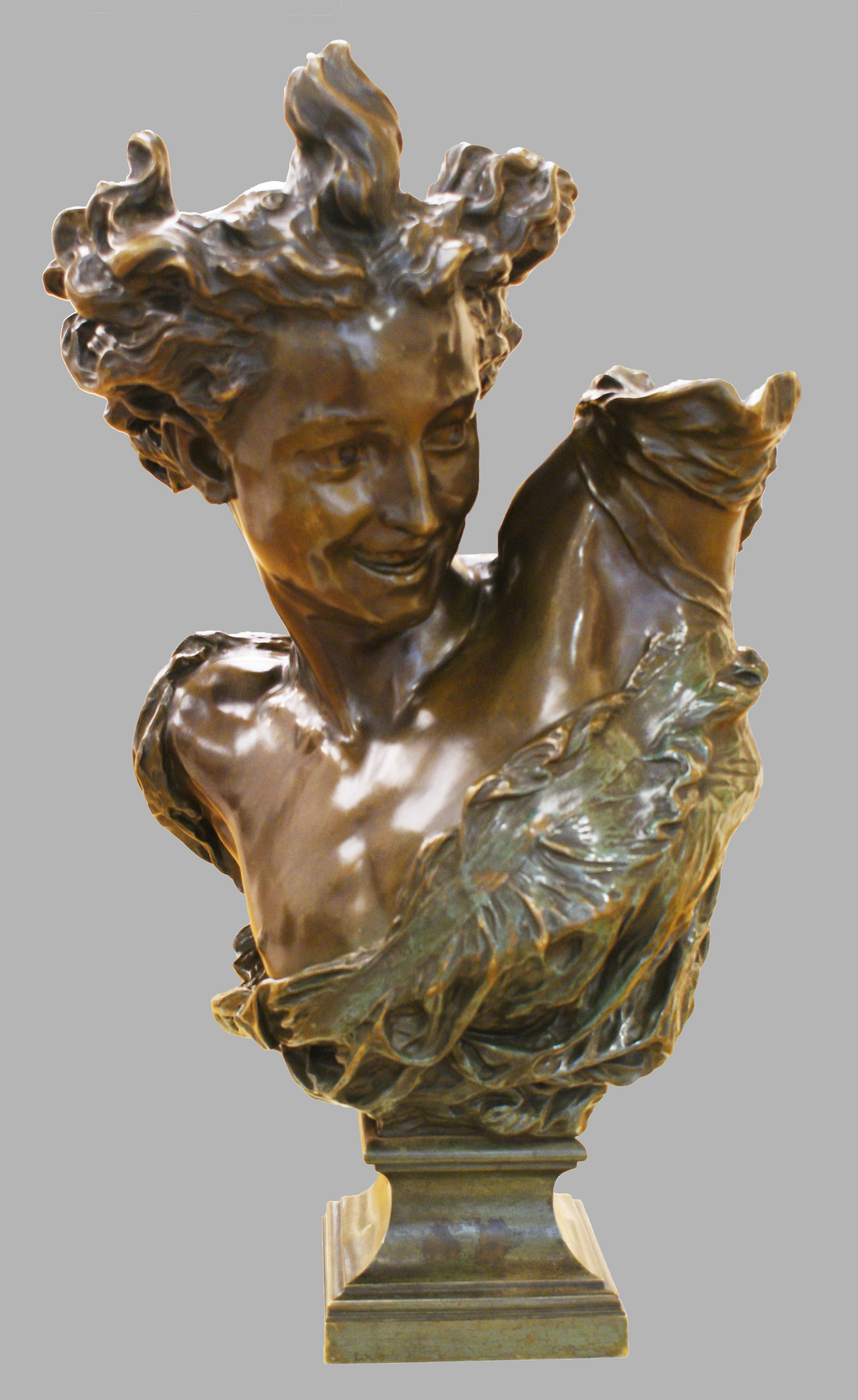 Бюст Генія танца. Бронза